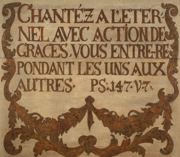 Celle, evangelisch-reformierte Kirche, Holztafel mit französischer Inschrift: Psalm 147:7 in der Übersetzung von David Martin (1)